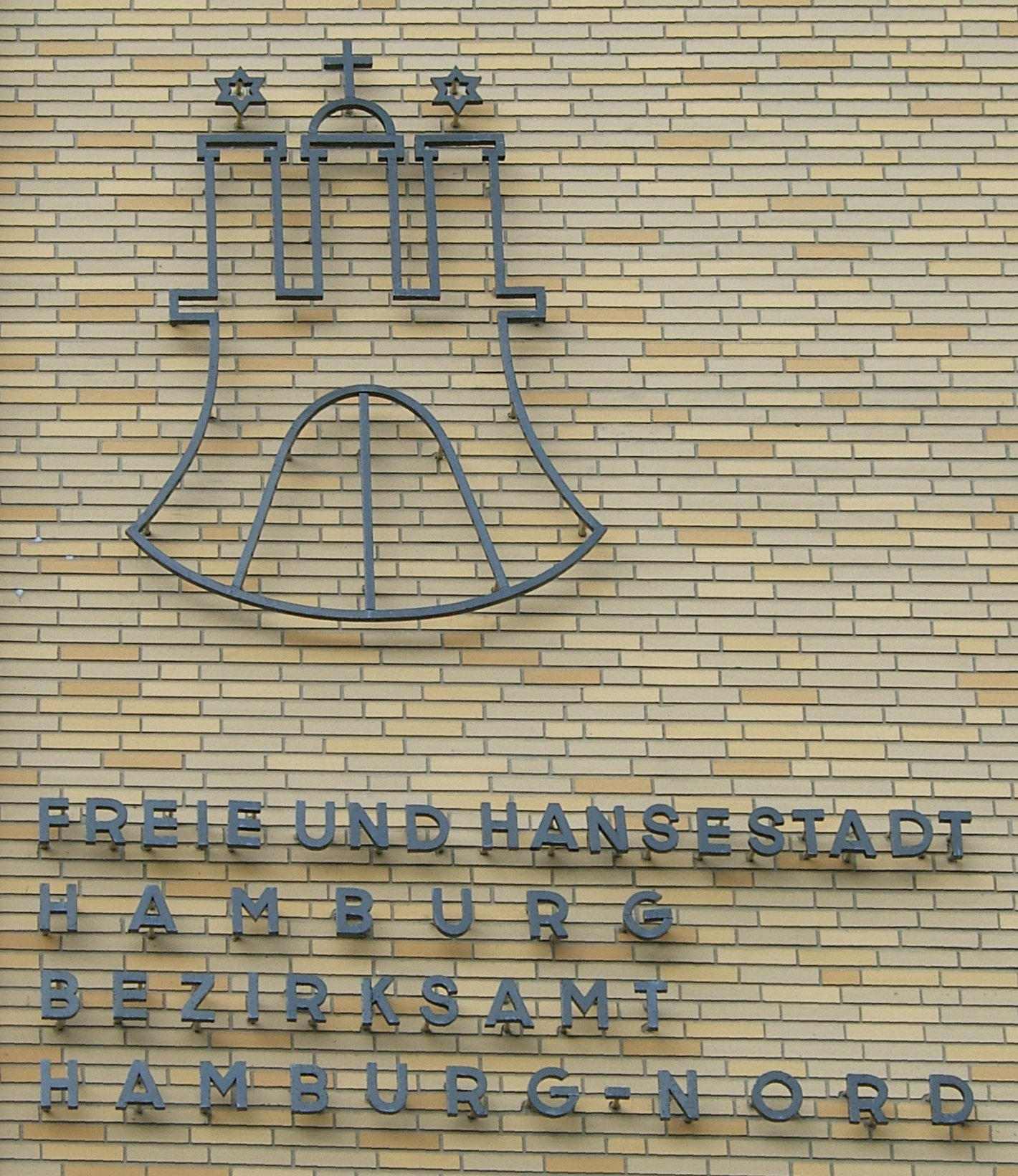 Hamburg-Wappen am Bezirksamt Hamburg-Nord in der Kümmellstraße 7 in Eppendorf